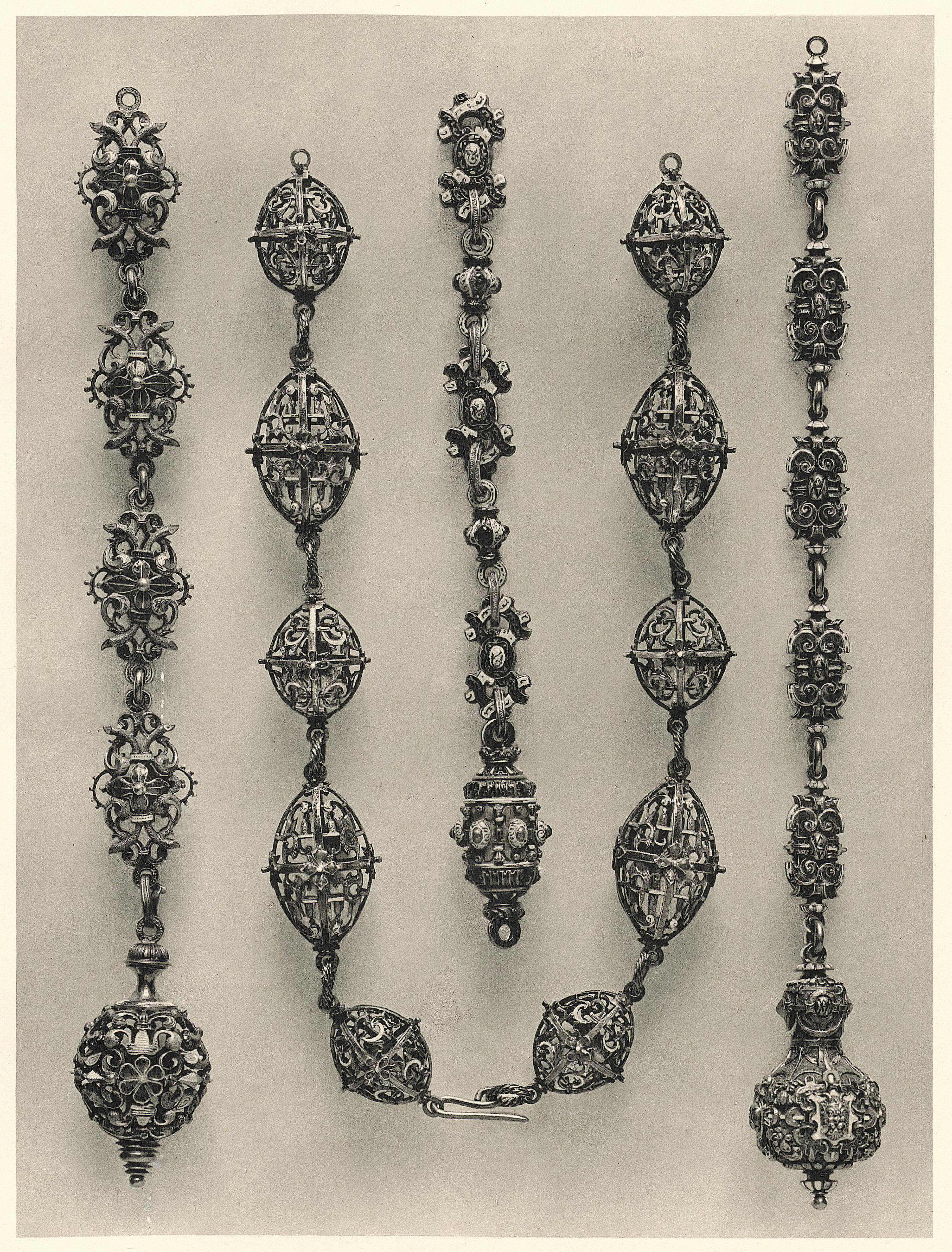 Teile von goldenen Gürtelketten der Renaissance, verziert mit Email (Beschreibung gemäß Quelle) aus: Das Grüne Gewölbe zu Dresden: eine Auswahl von Meisterwerken der Goldschmiedekunst ; in vier Bänden (Band 3): Kleinodien der Goldschmiedekunst: verziert mit Email und Juwelen, Erzeugnisse der Steinschneidekunst in Bergkristall und farbigen Steinarten in kostbarsten Fassungen, Galanteriewaren und Nippesfiguren, Kabinettstücke ; mit 59 Lichtdrucktafeln, davon 7 farbig. Hiersemann, Leipzig